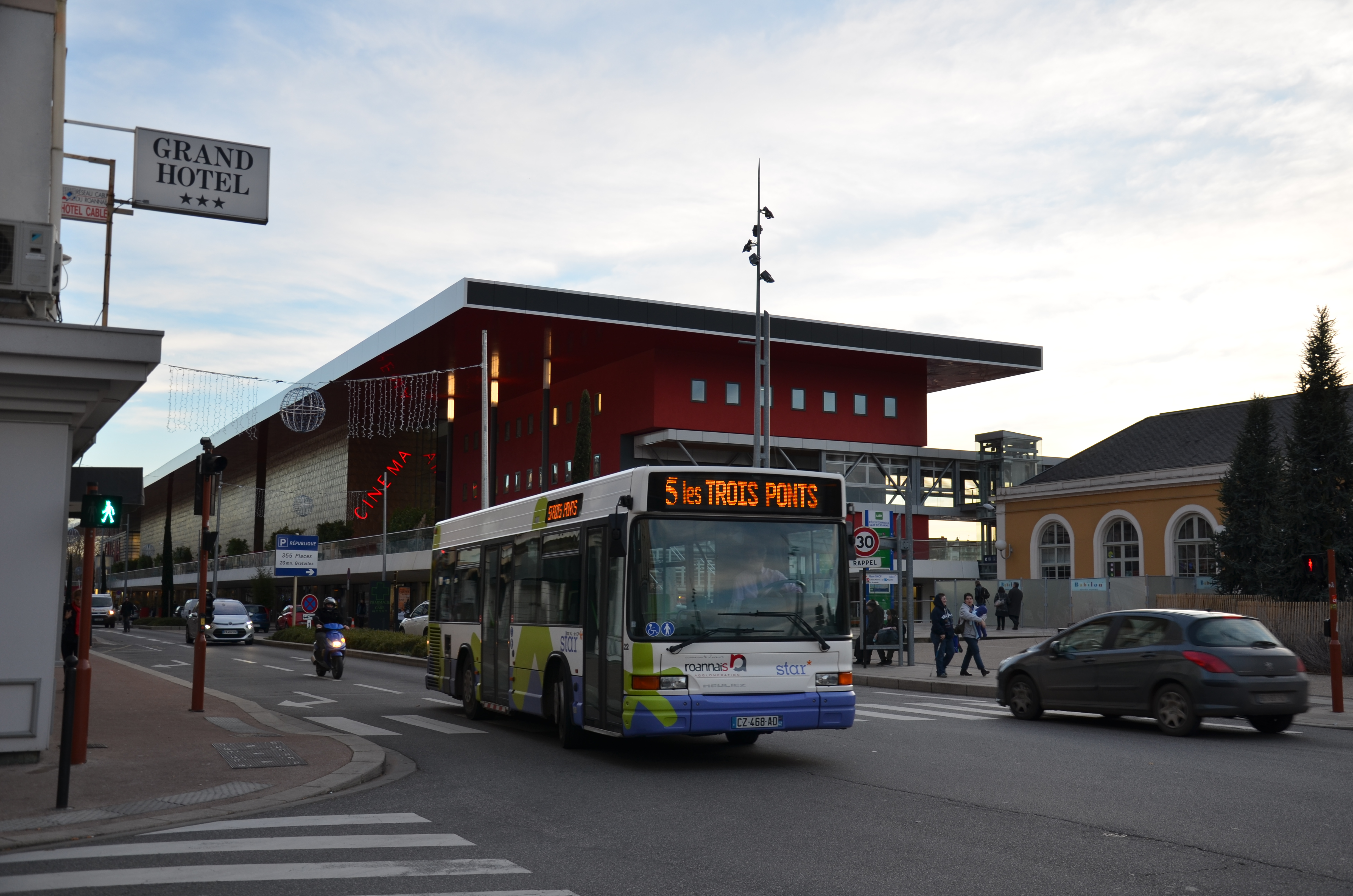 Heuliez GX 117 n°22 sur la ligne 5 du réseau STAR de Roanne, devant la gare SNCF.